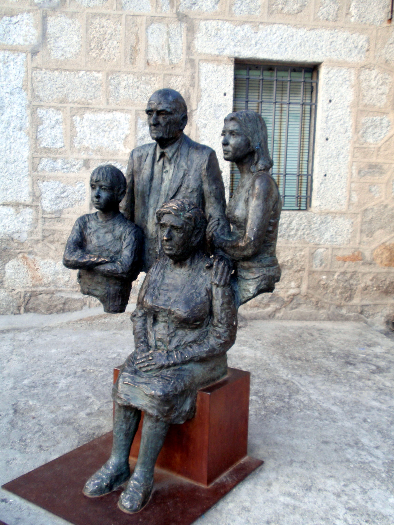 Torrelodones. Escultura Retrato de los Abuelos. Detalle.